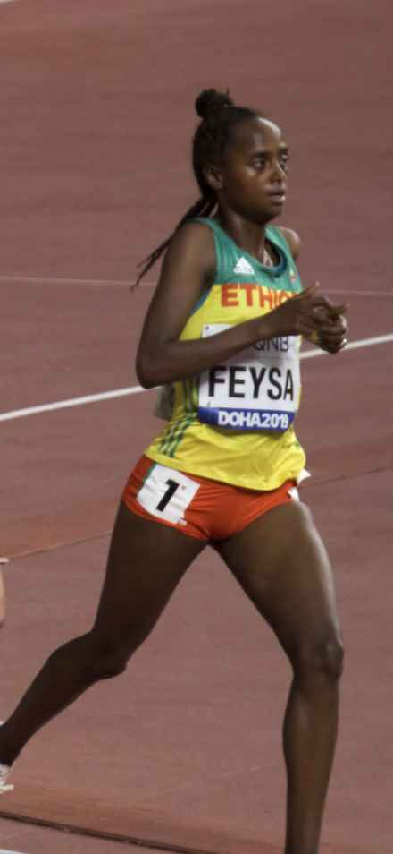 DOH80467 5000m women mccolgan